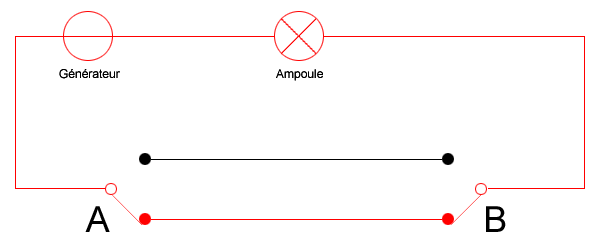 Schéma électrique d'un va et vient Pour Mr Bernstein